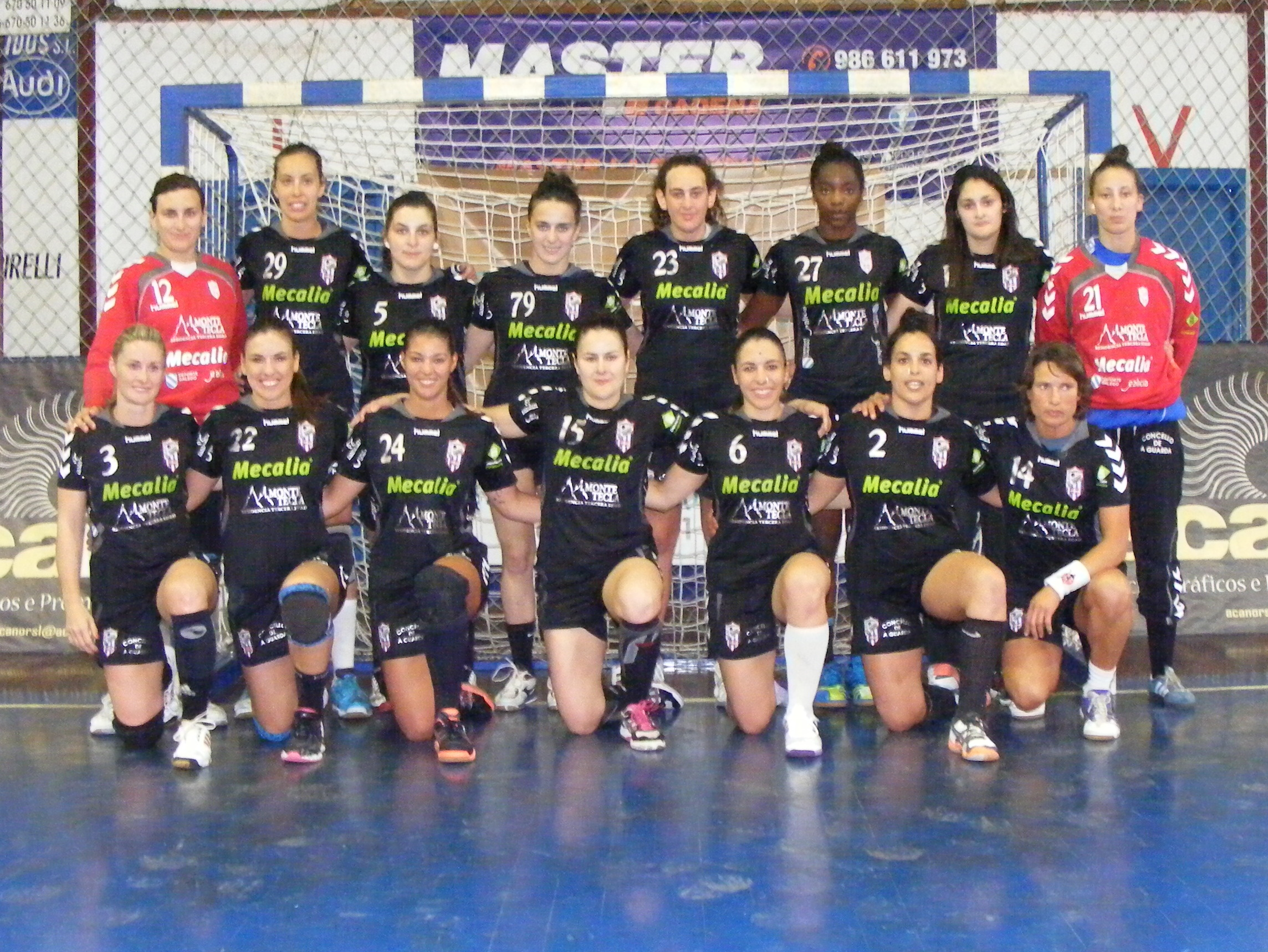 Partido del Atlético Guardés contra el Castelldefels el 17 de mayo de 2014